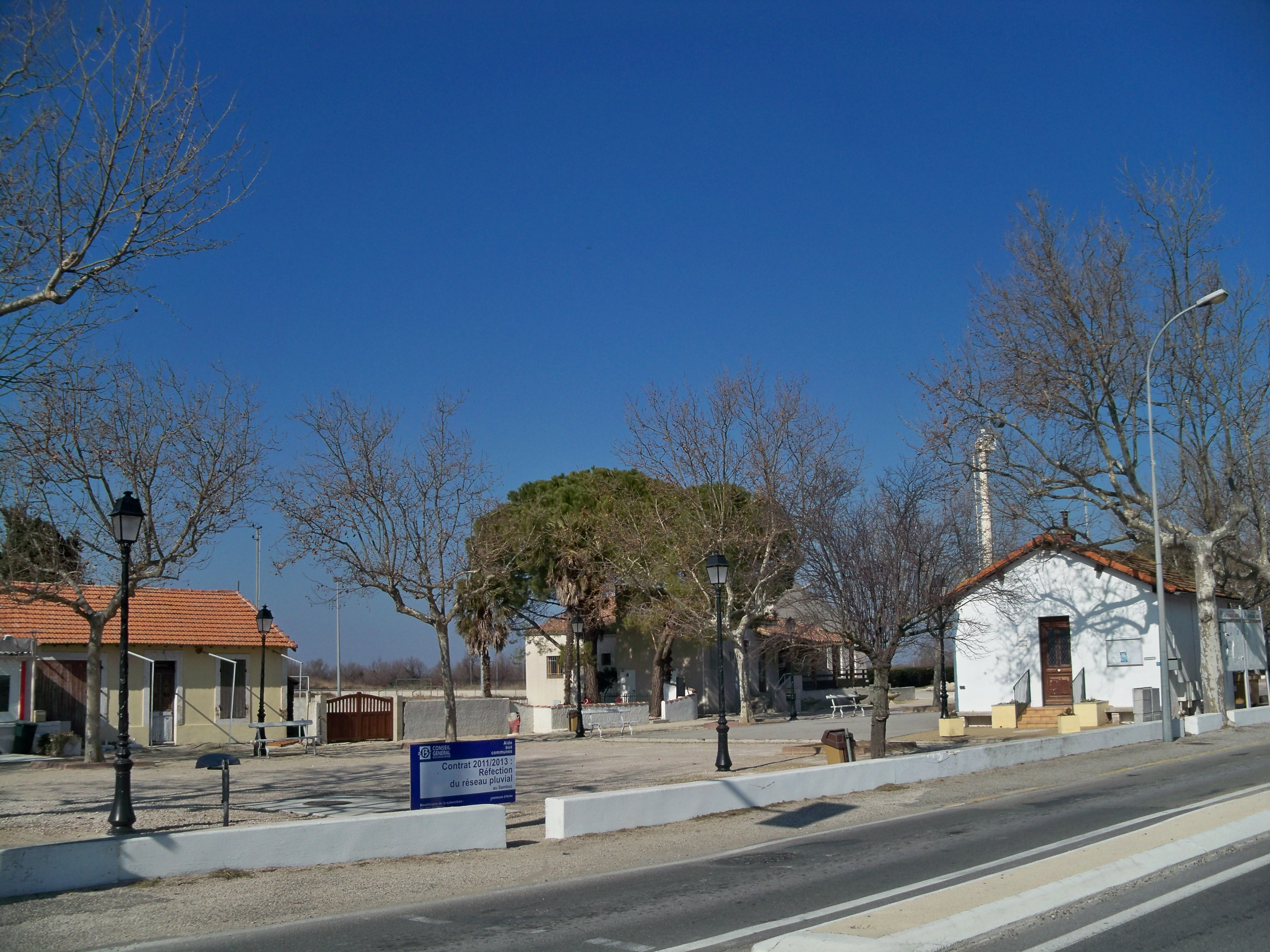 place de la mairie au Sambuc (13)